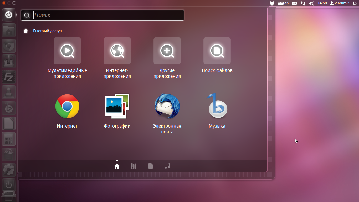 Рабочий стол Ubuntu 11.10 с Unity